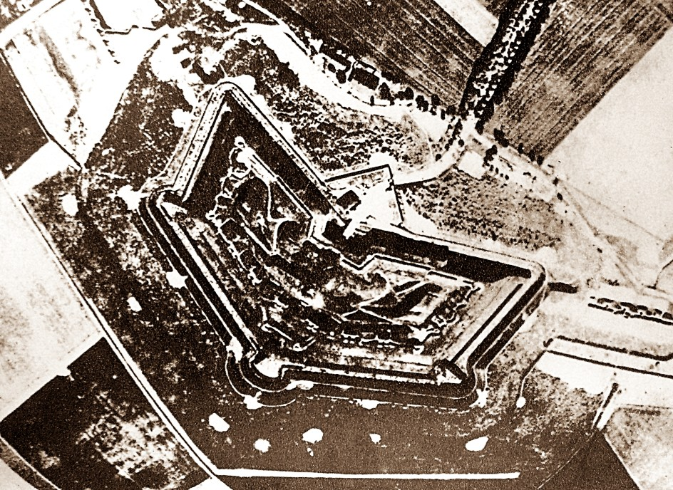 Fort I, zdj. lotnicze